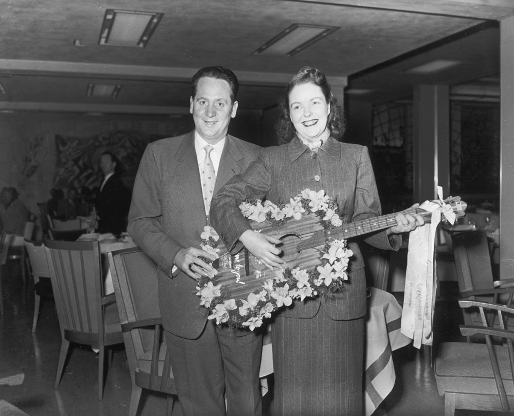 Les Paul en Mary Ford op Schiphol met versierde gitaar, 14 januari 1955 Foto Ben van Meerendonk / AHF, collectie IISG, Amsterdam